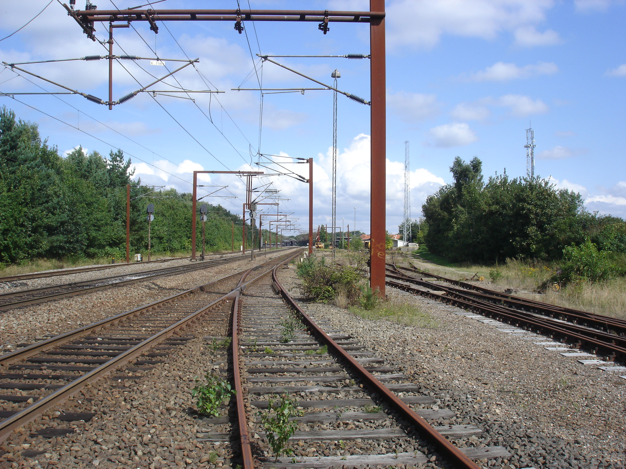 Aabenraabanens afgrening på Rødekro Station